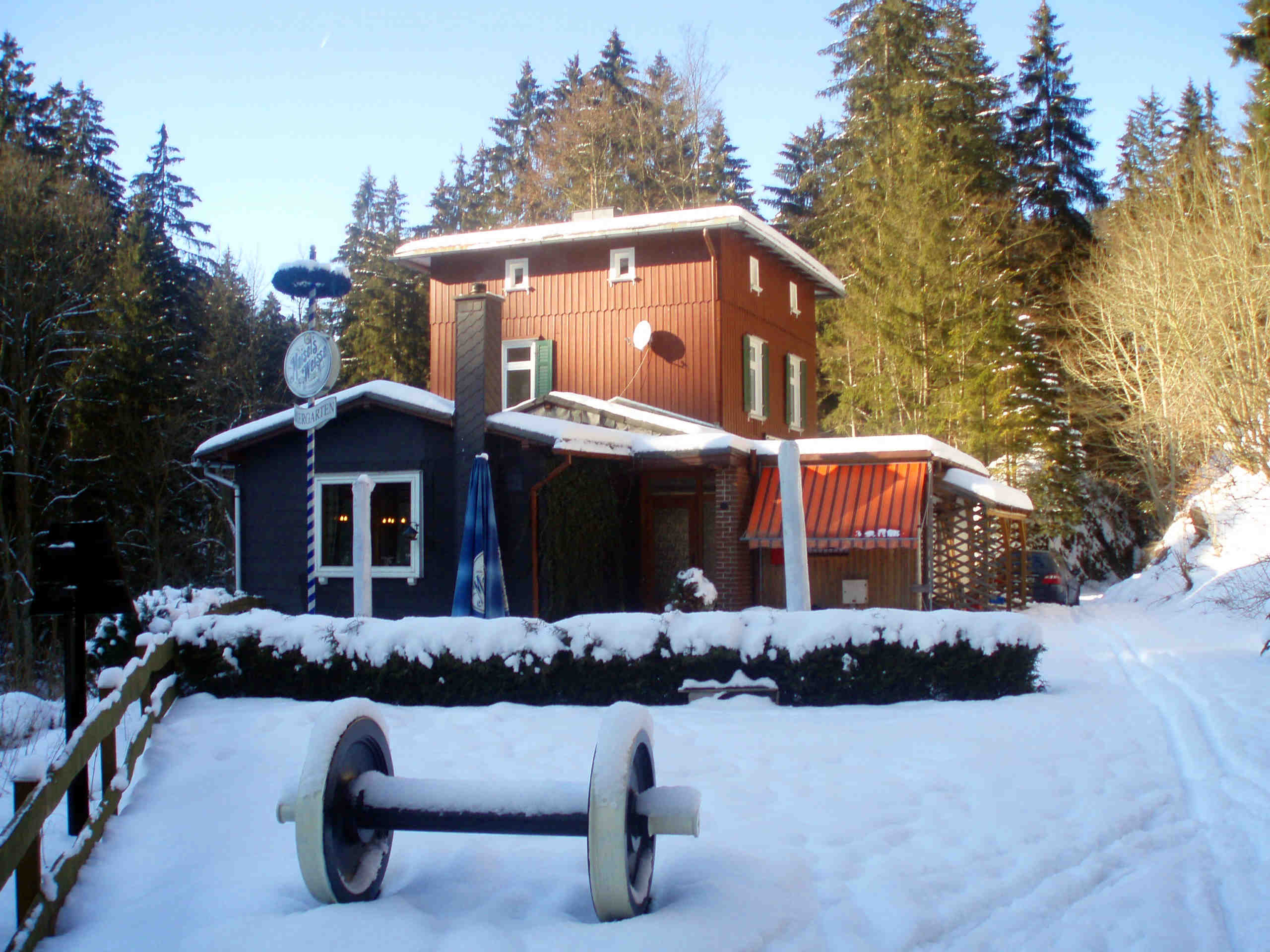 Am früheren Bahnhof Stöberhai